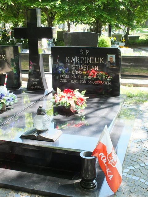 Cmentarz Komunalny (Kołobrzeg)